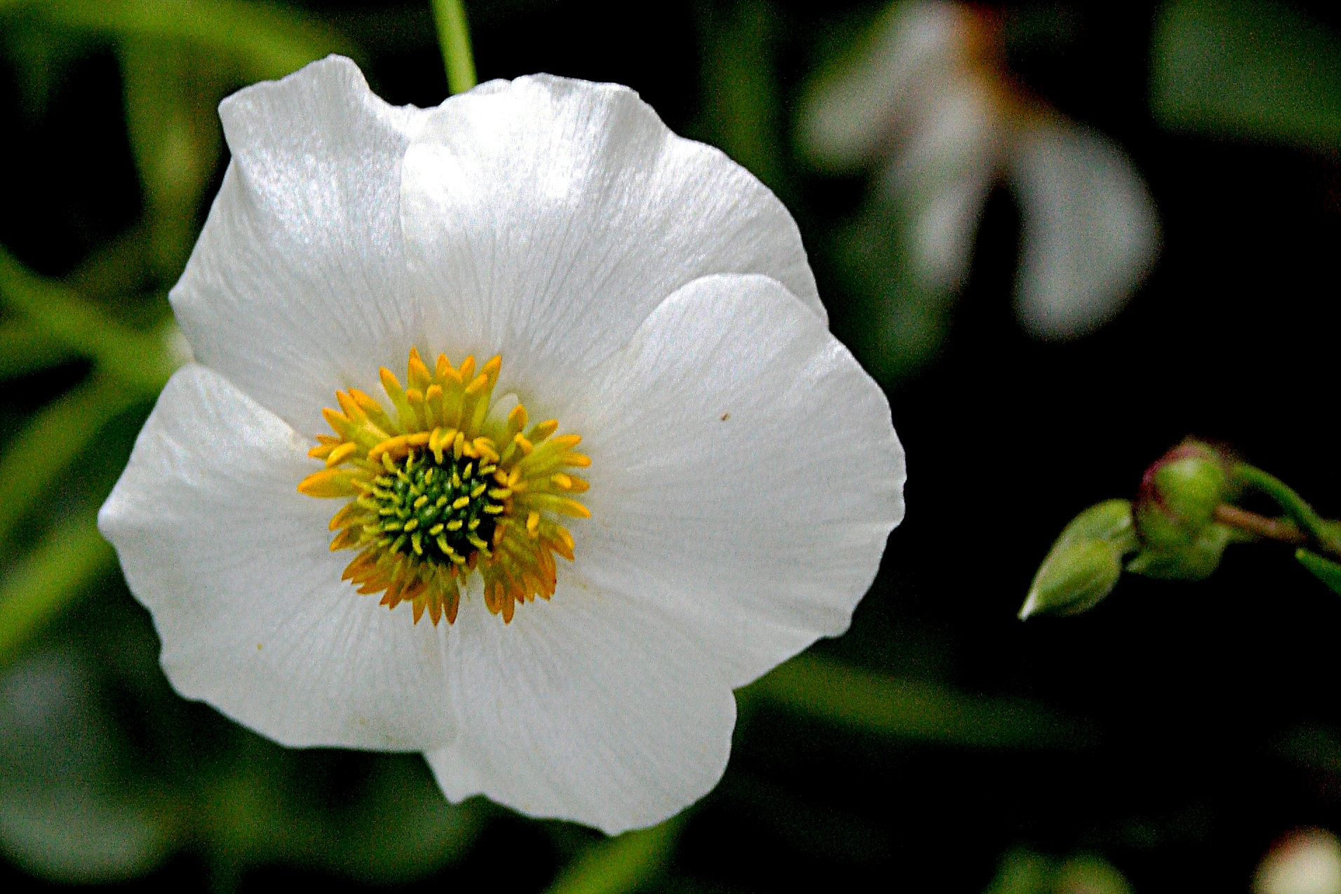 Ísland, Akureyri Botanical Gardens: Herzblättriger_Hahnenfuß_(Ranunculus_parnassifolius)